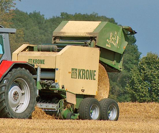 Krone VarioPack Ronnbalepress (Ronnbottepress).